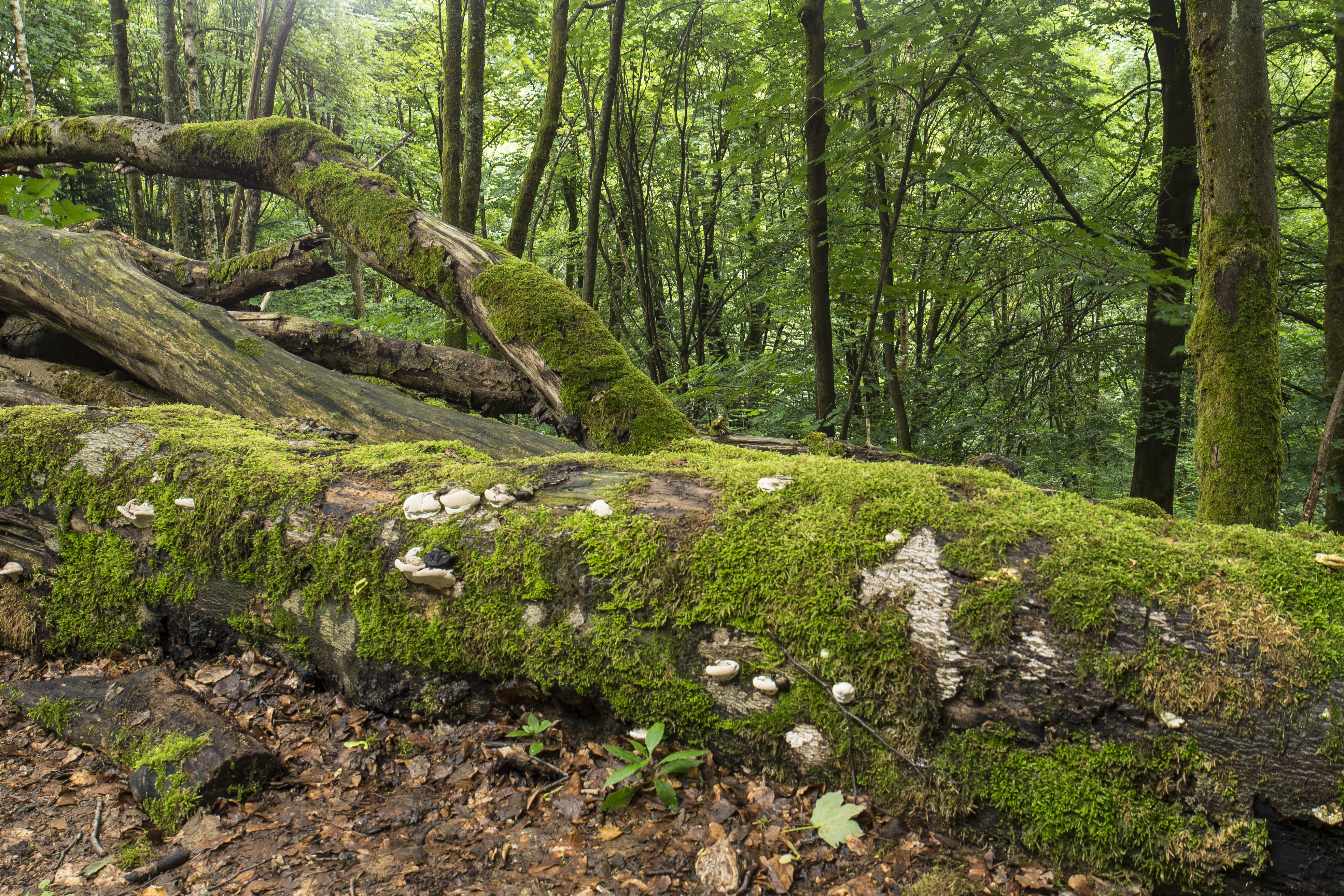 Mit Moos und Pilzen bewachsener Baumstamm auf den Schluchten- und Brückenpfad im NSG Helle (HSK-424) in Winterberg.